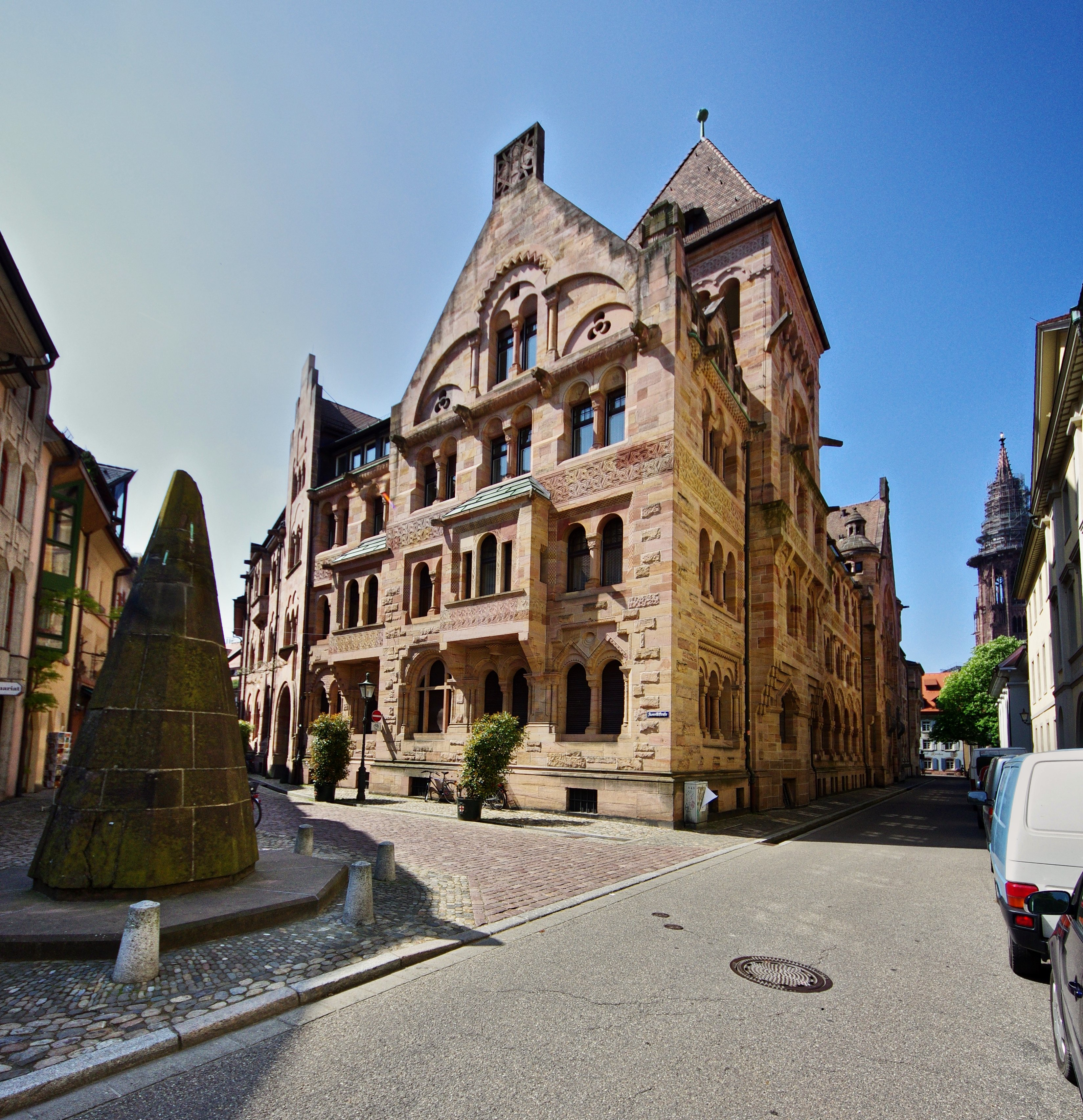 Erbischöflichen Ordinariat